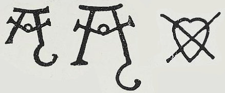 Marques d'atelier non identifiées relevées sur les tapisseries de la Tenture de Jérôme Bosch.